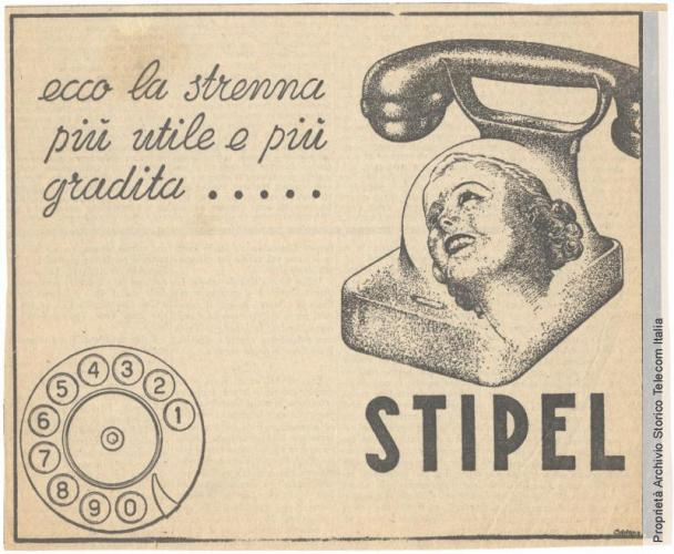 Immagine pubblicitaria telefoni STIPEL